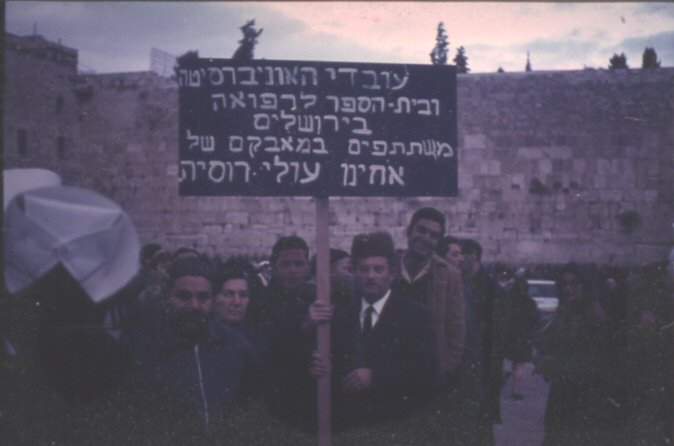 מאבק למען עליה מברית המועצות